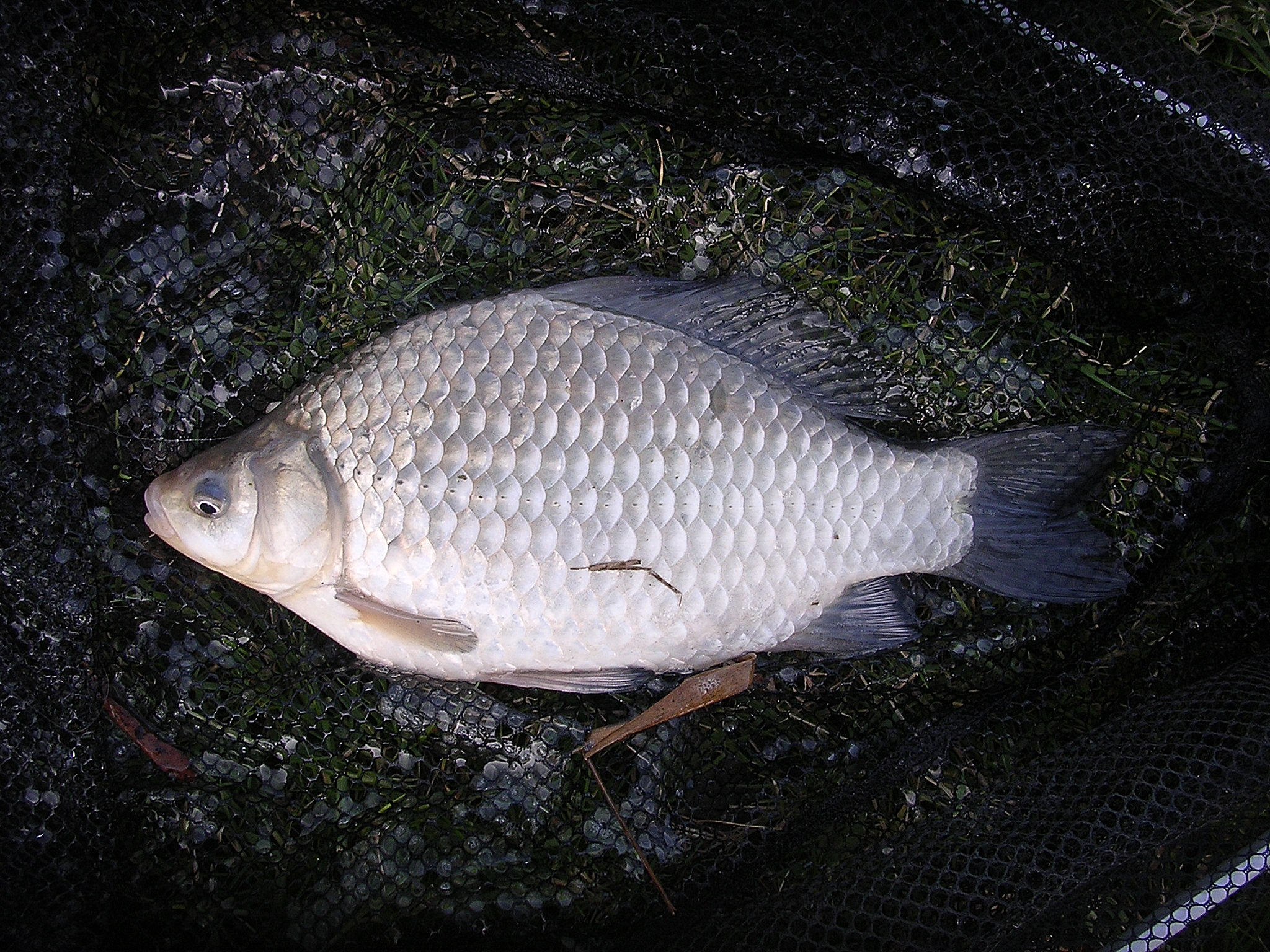 Carassius auratus giebel frans komen